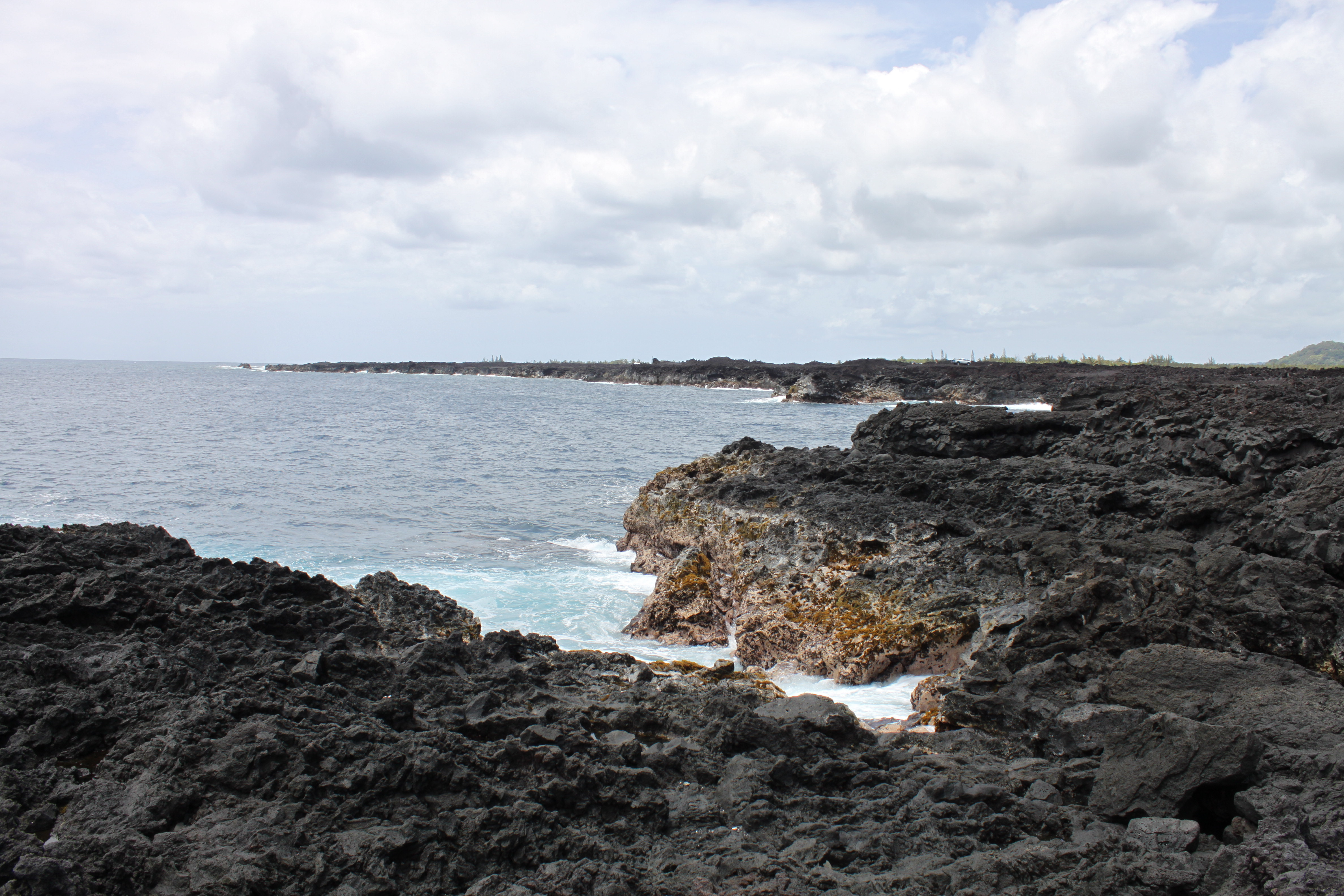 Hawaii: Cape Kumukahi. 1960 lava flow of Kīlauea.